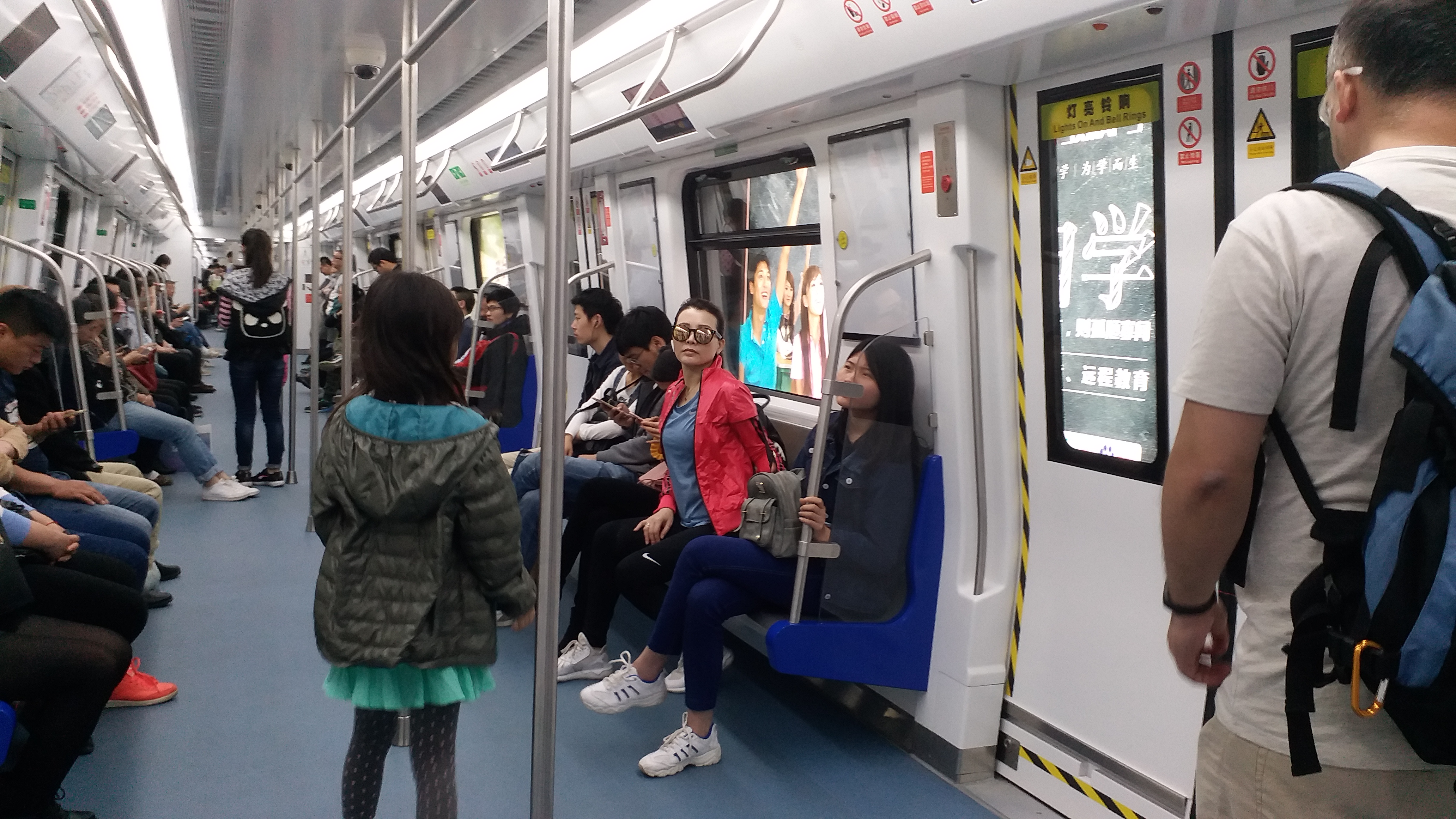 中文（香港）: 7号线车厢内部